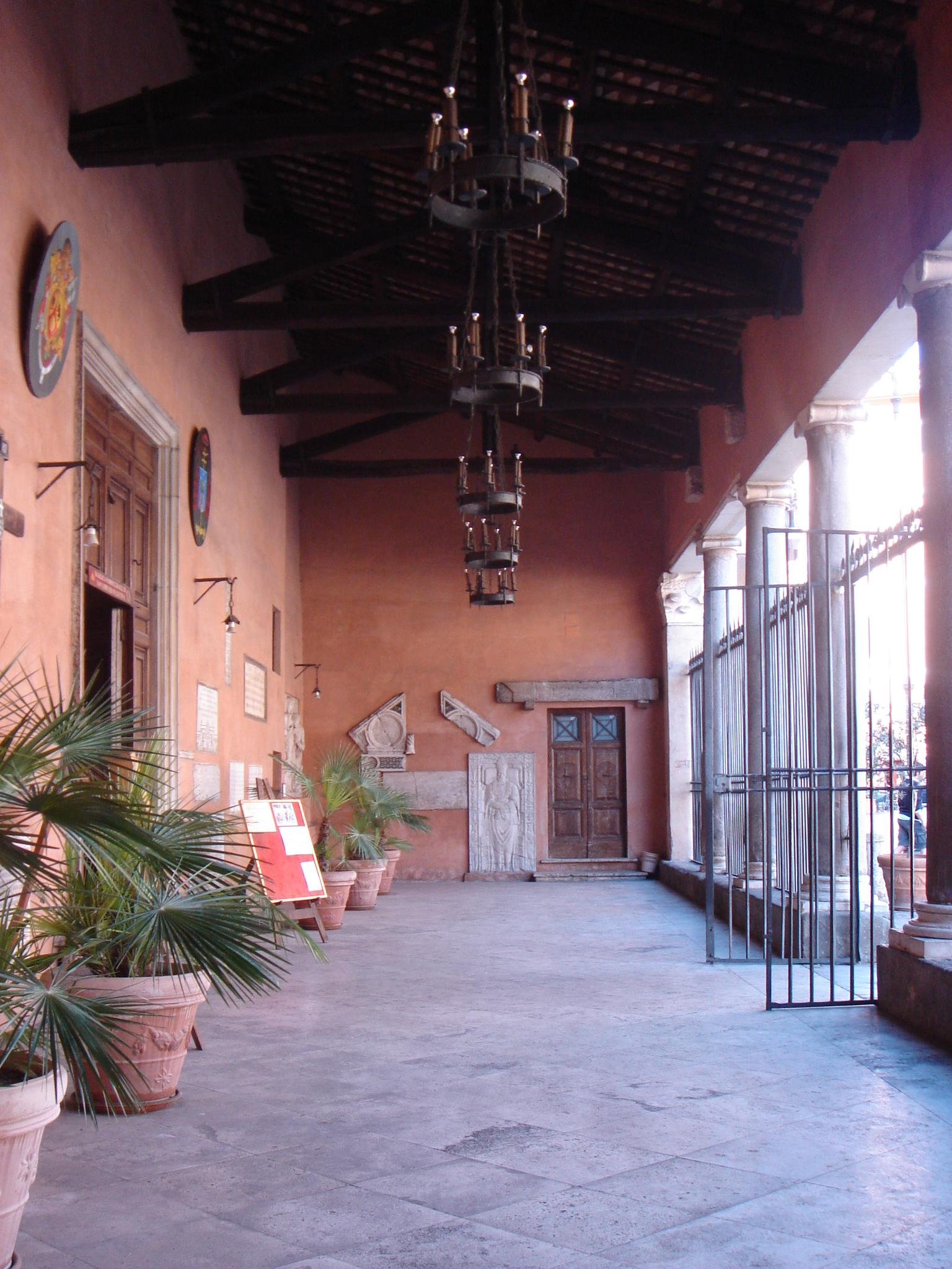 Roma, San Lorenzo in Lucina: portico.